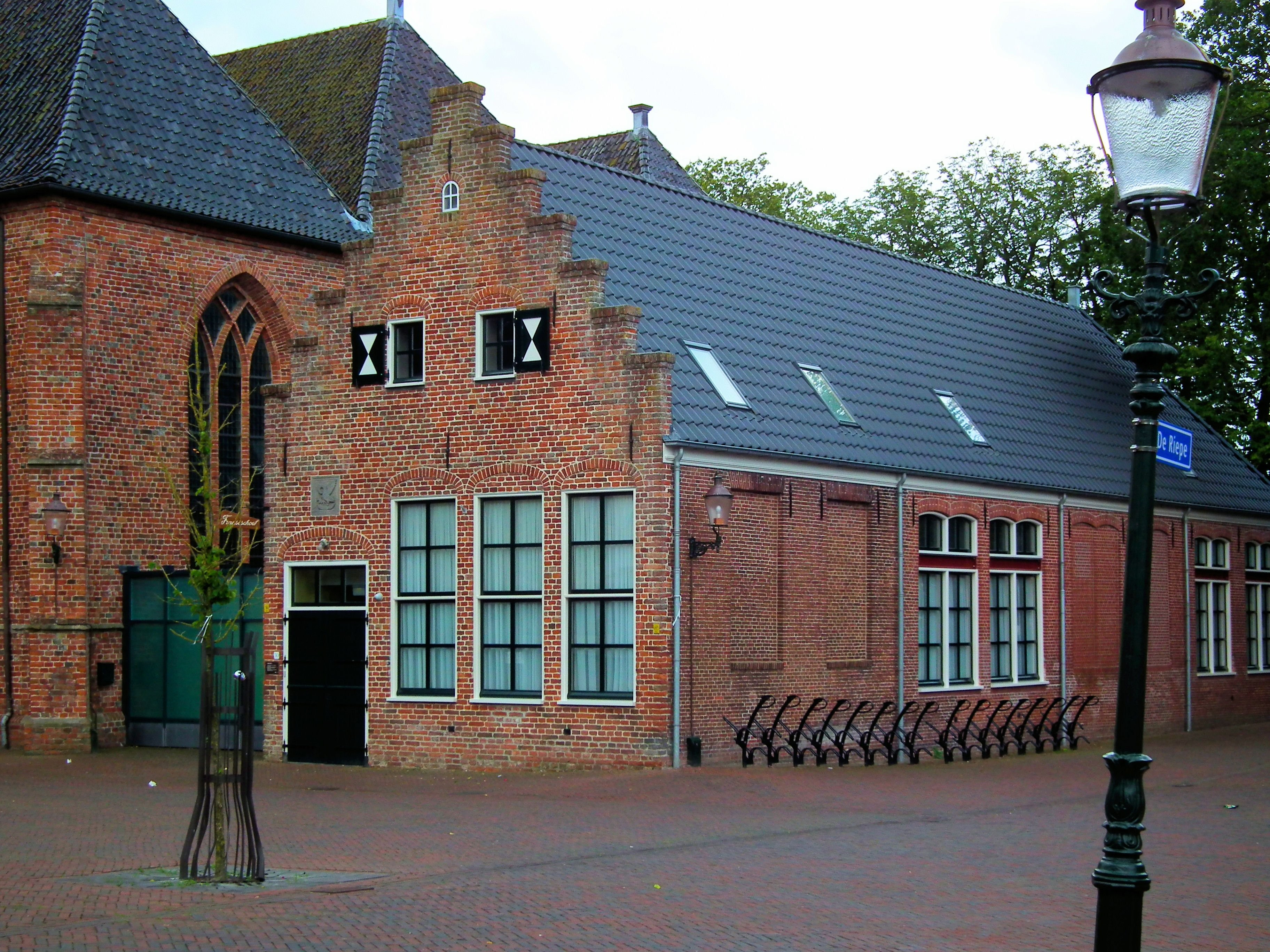 Het historische centrum van Appingedam (NL) - Franse school